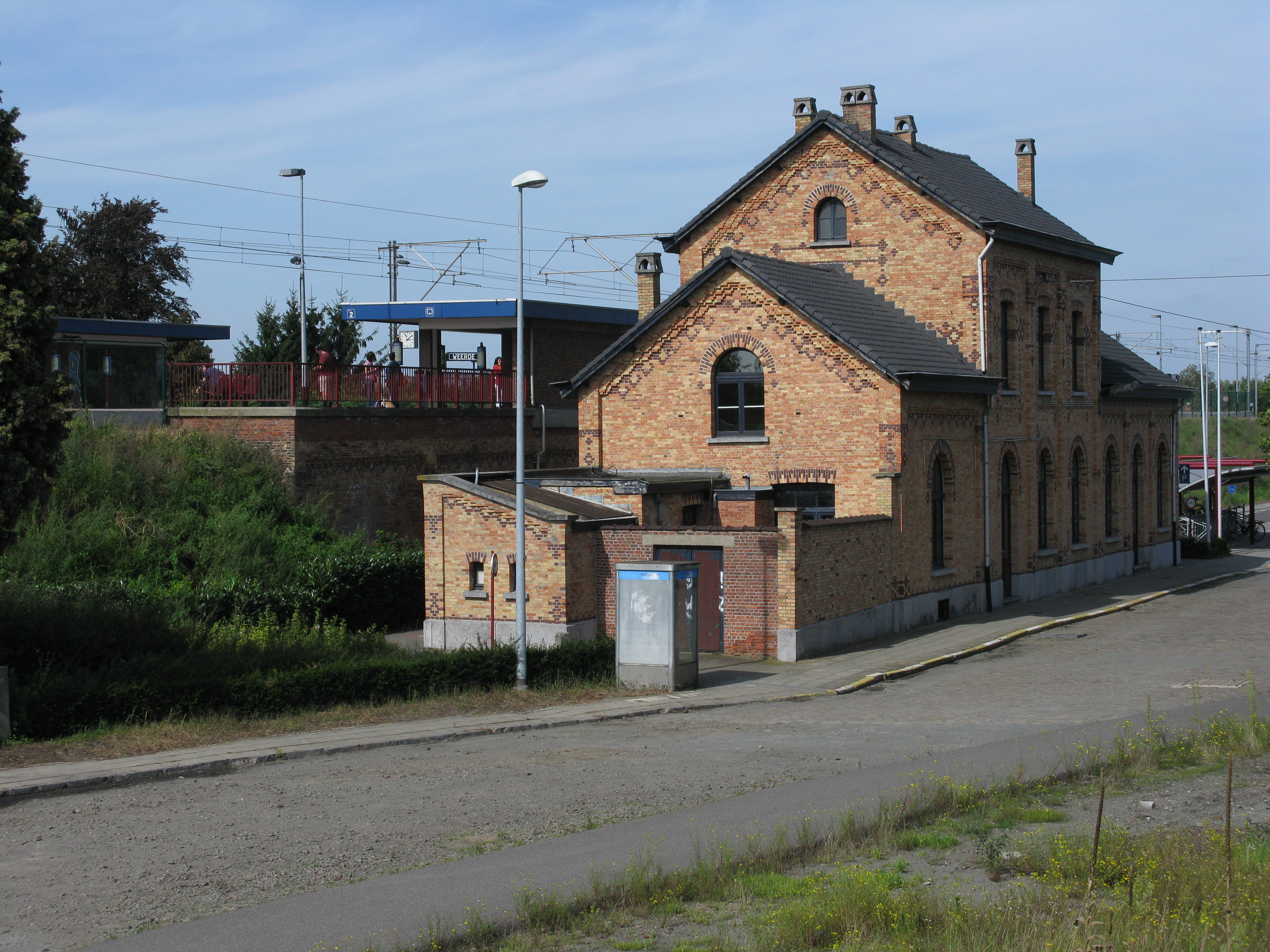 Station Weerde (gemeente Zemst)